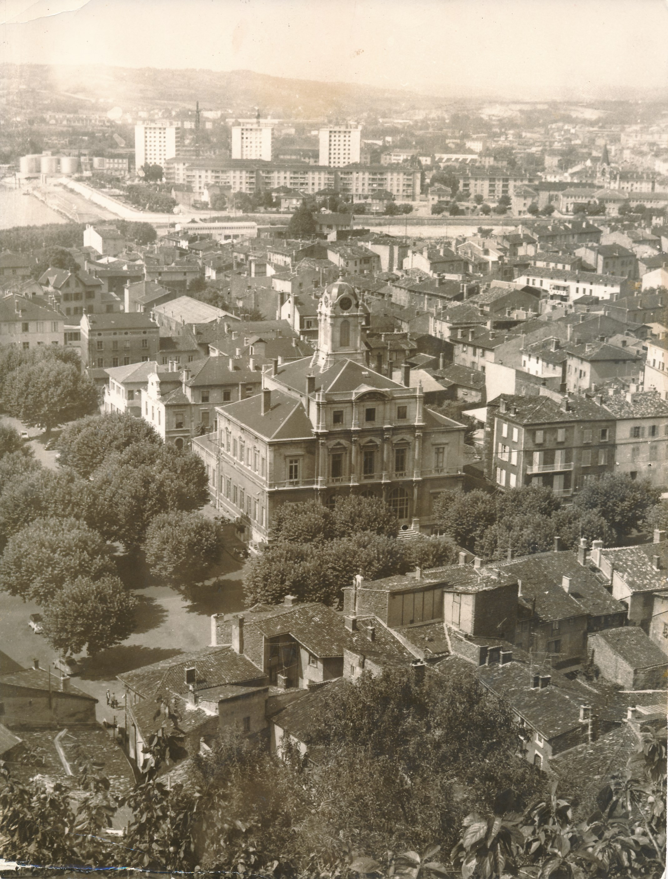 Vieux-Givors, env. 1960. Archives municipales de Givors, cote 5Fi 2016